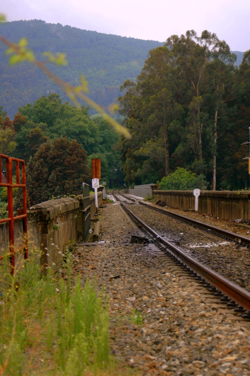 Redondela, Galicia